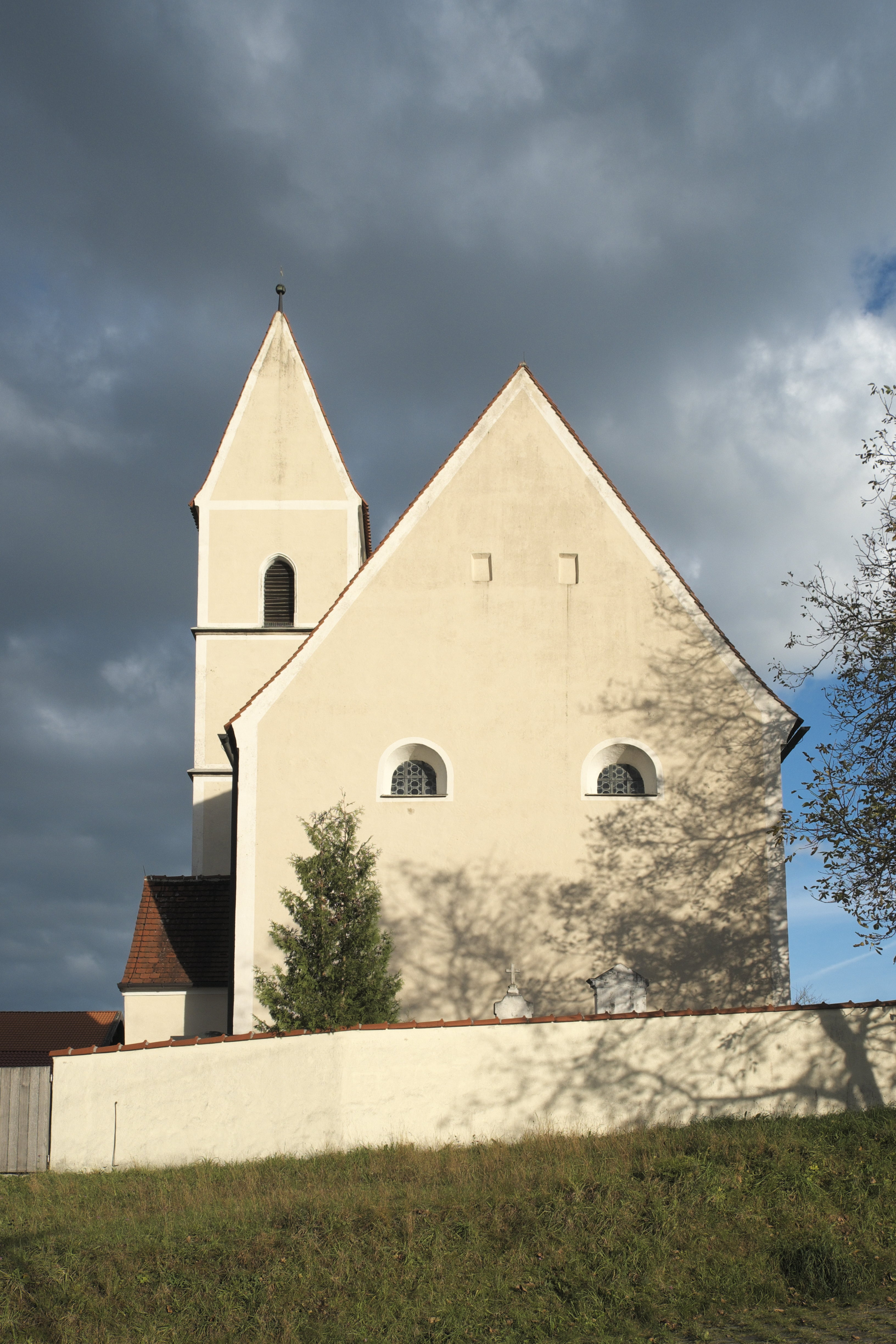 Katholische Filialkirche Mariä Himmelfahrt in Lampferding (Tuntenhausen) im Landkreis Rosenheim (Bayern/Deutschland), Westfassade